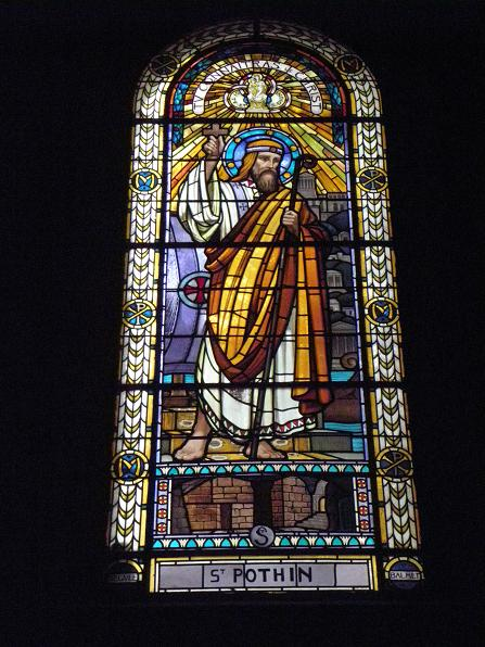 Vitrail de St-Pothin par Bégule (Eglise St-Pothin de Lyon)